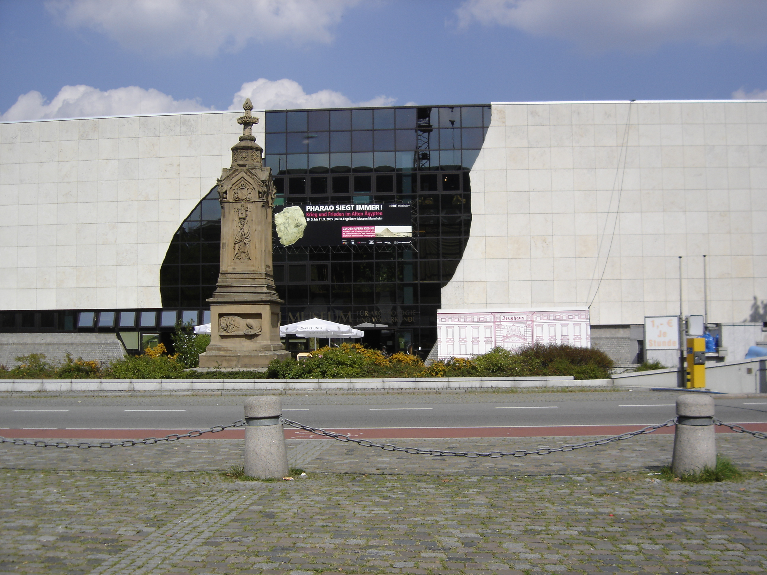 Summary Mannheim, Reiss-Engelhorn-Museen, D 5